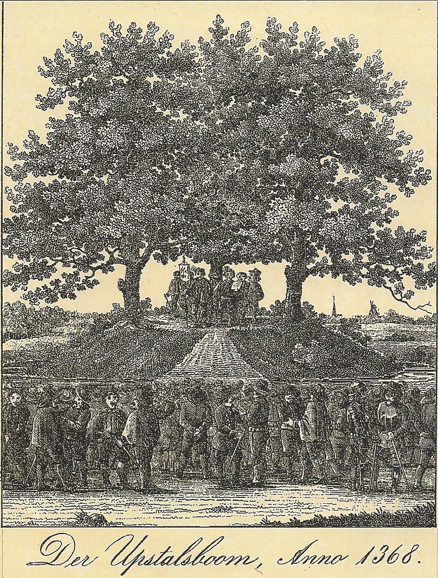 Der Upstalsboom, Anno 1368, Historisierende Radierung aus dem 19. Jh.